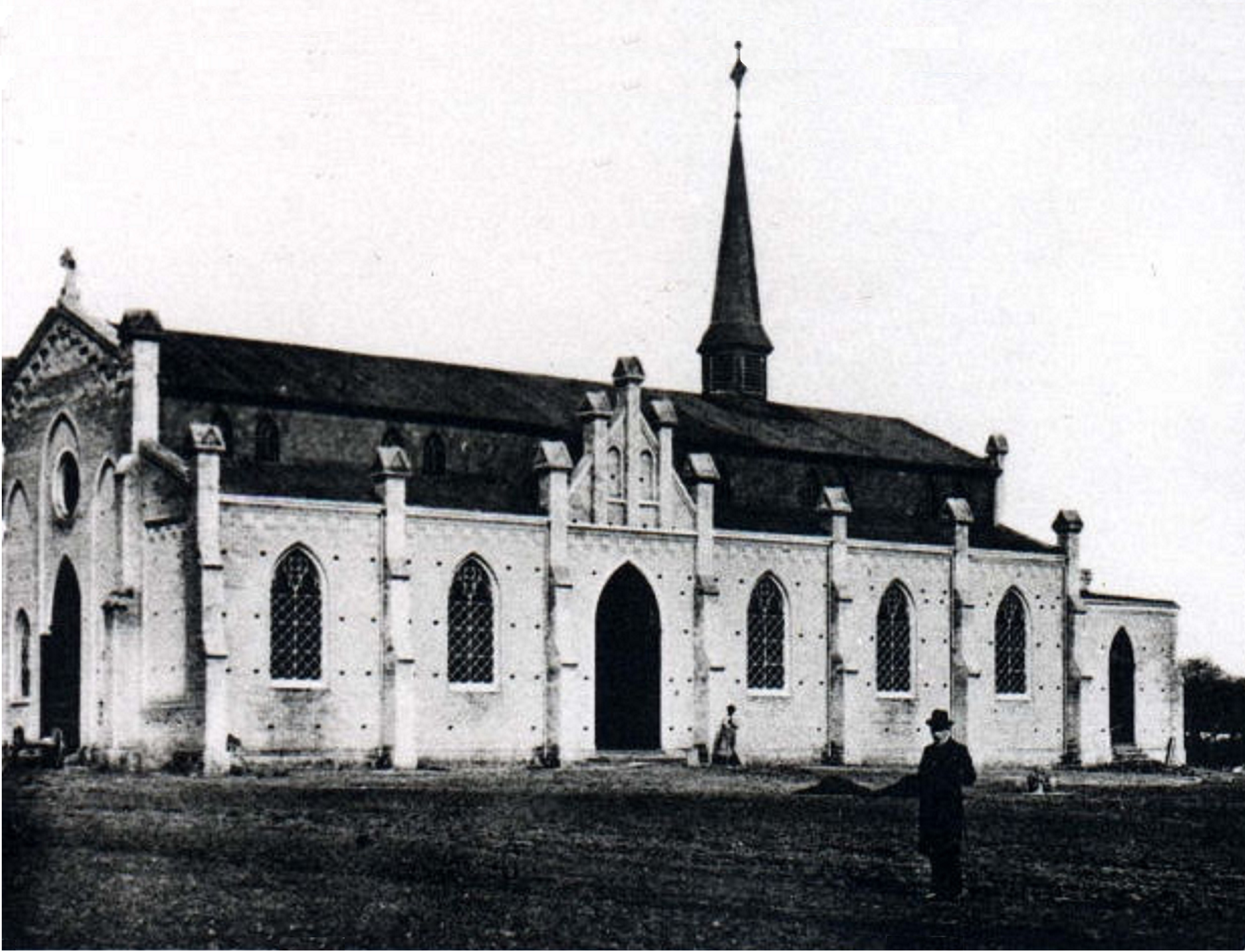 St. Marien, Dorsten-Hervest, North Rhine-Westphalia, Germany